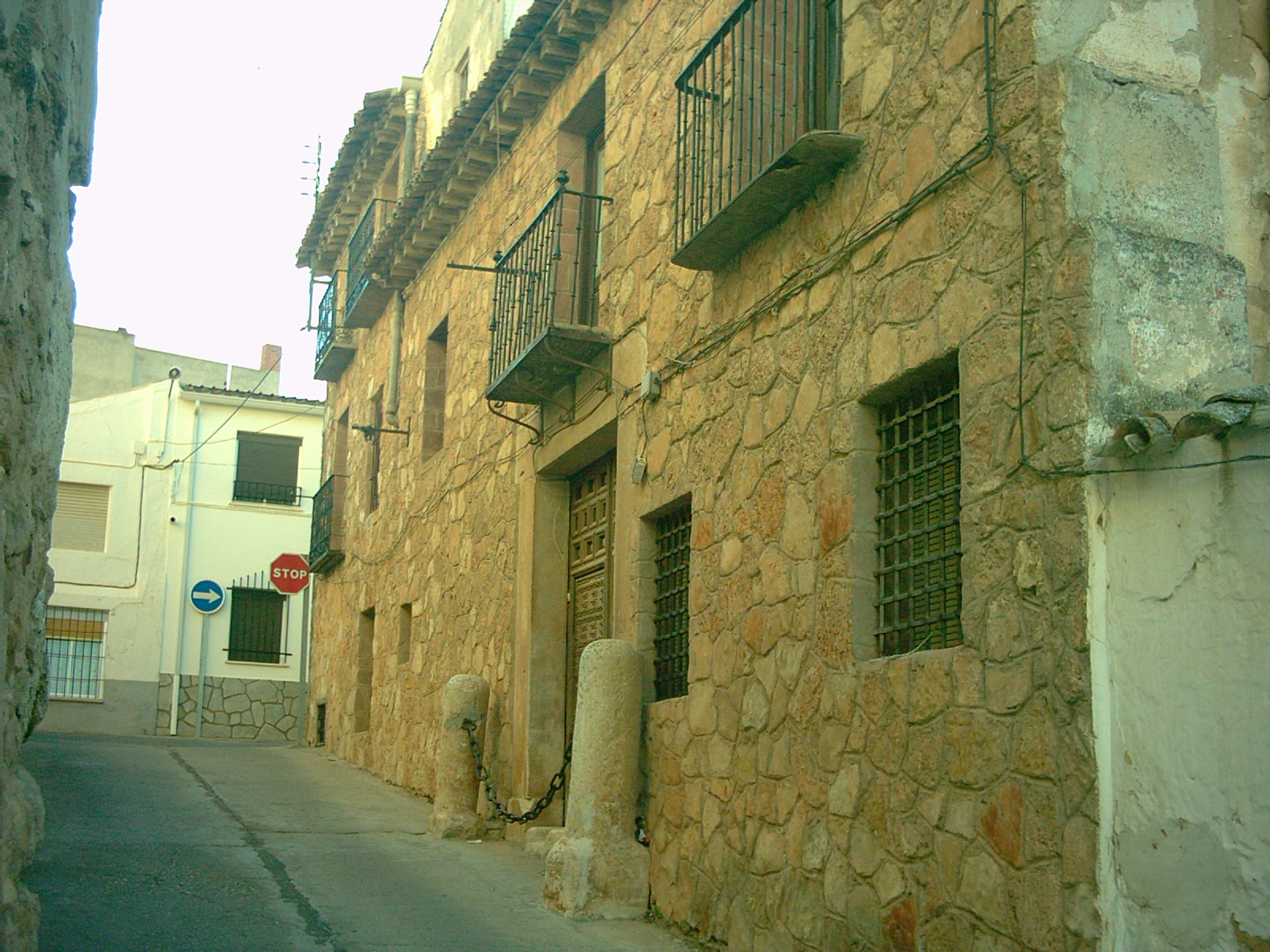 Casa de la Cadena en Santa Cruz de la Zarza (Toledo, España)//House of Chain in Santa Cruz de la Zarza (Spain)